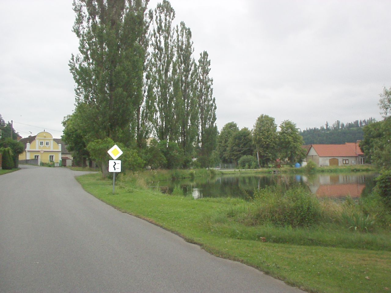 vjezd do Pacelic od Blatné a rybník